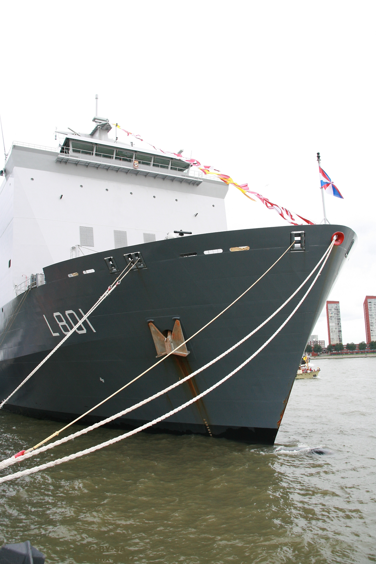 Boeg van de Johan de Witt in Rotterdam tijdens de Wereldhavendagen